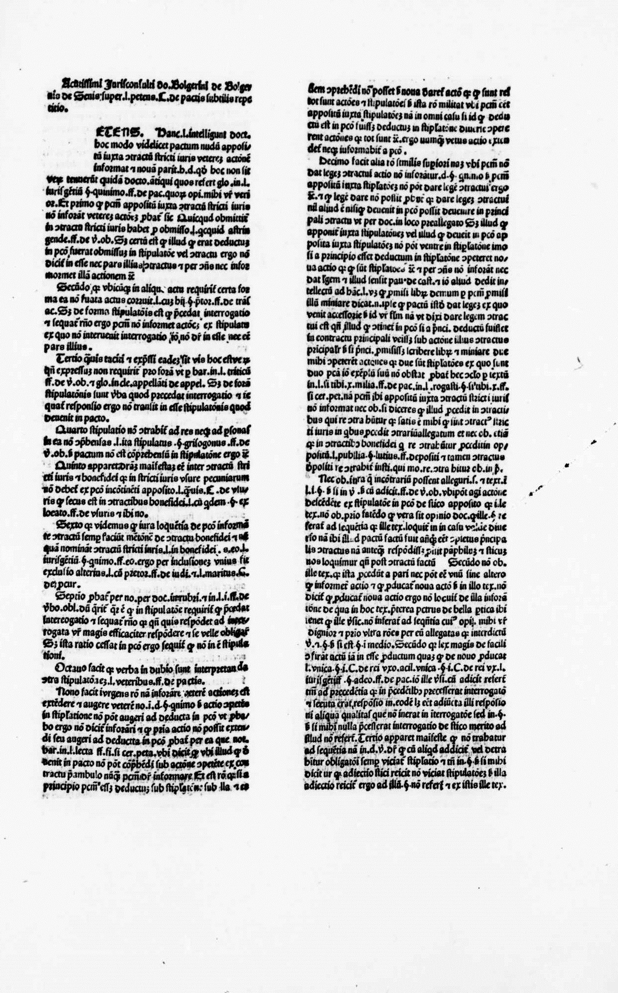 Carta p2r